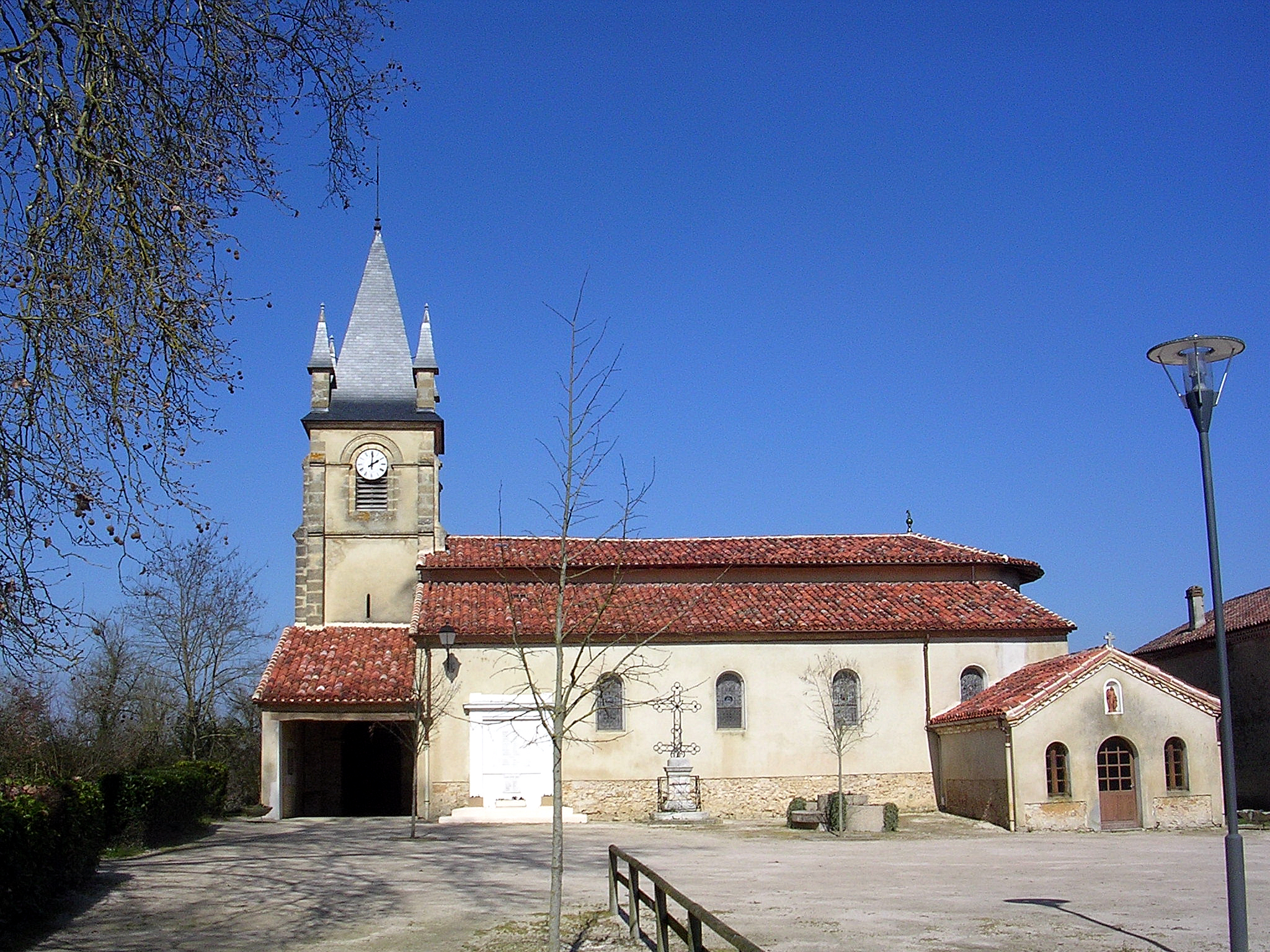 Église Notre-Dame de l’Assomption à Maurrin, dans le département français des Landes